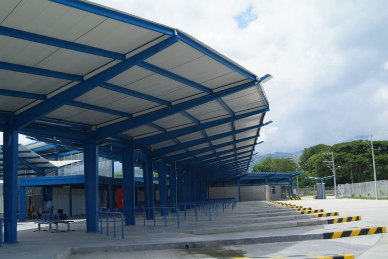 Terminal de Buga